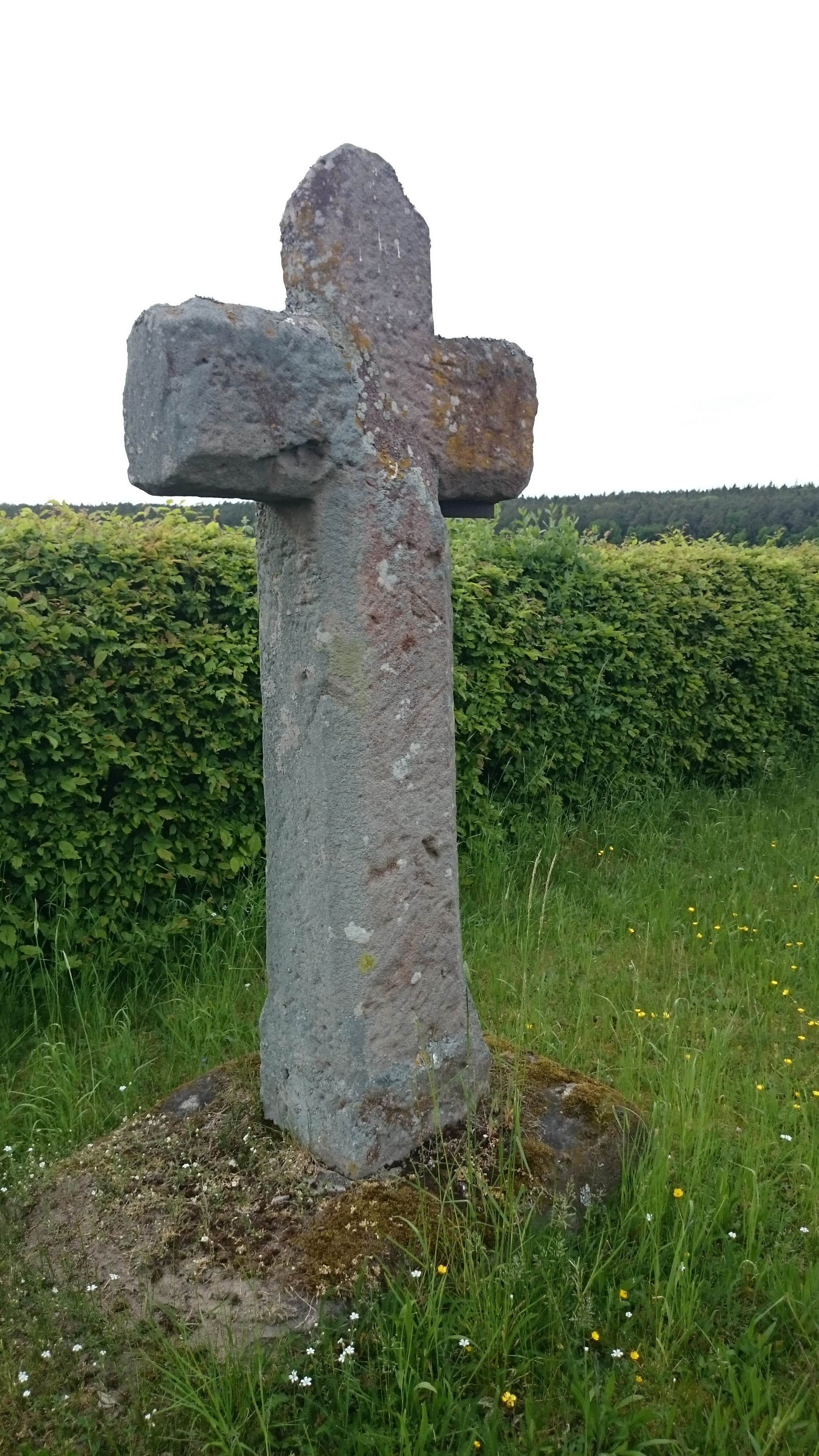 Sühnekreuz bei Linden (Markt Erlbach)